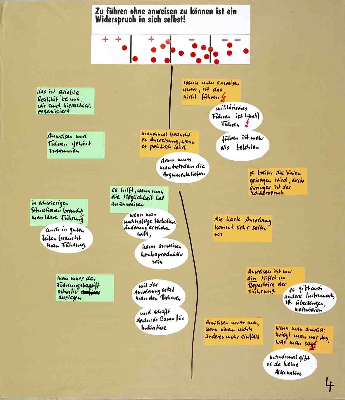 Nach der Metaplan-Methode moderierte These: Die im Titelstreifen aufgestellte Behauptung wurde zunächst mit roten Klebepunkten bewertet, dann dafürsprechende (grün) und dagegensprechende (orange) Argumente gesammelt und diskutiert. Einwände gegen genannte Argumente wurden mit Blitzen gekennzeichnet.